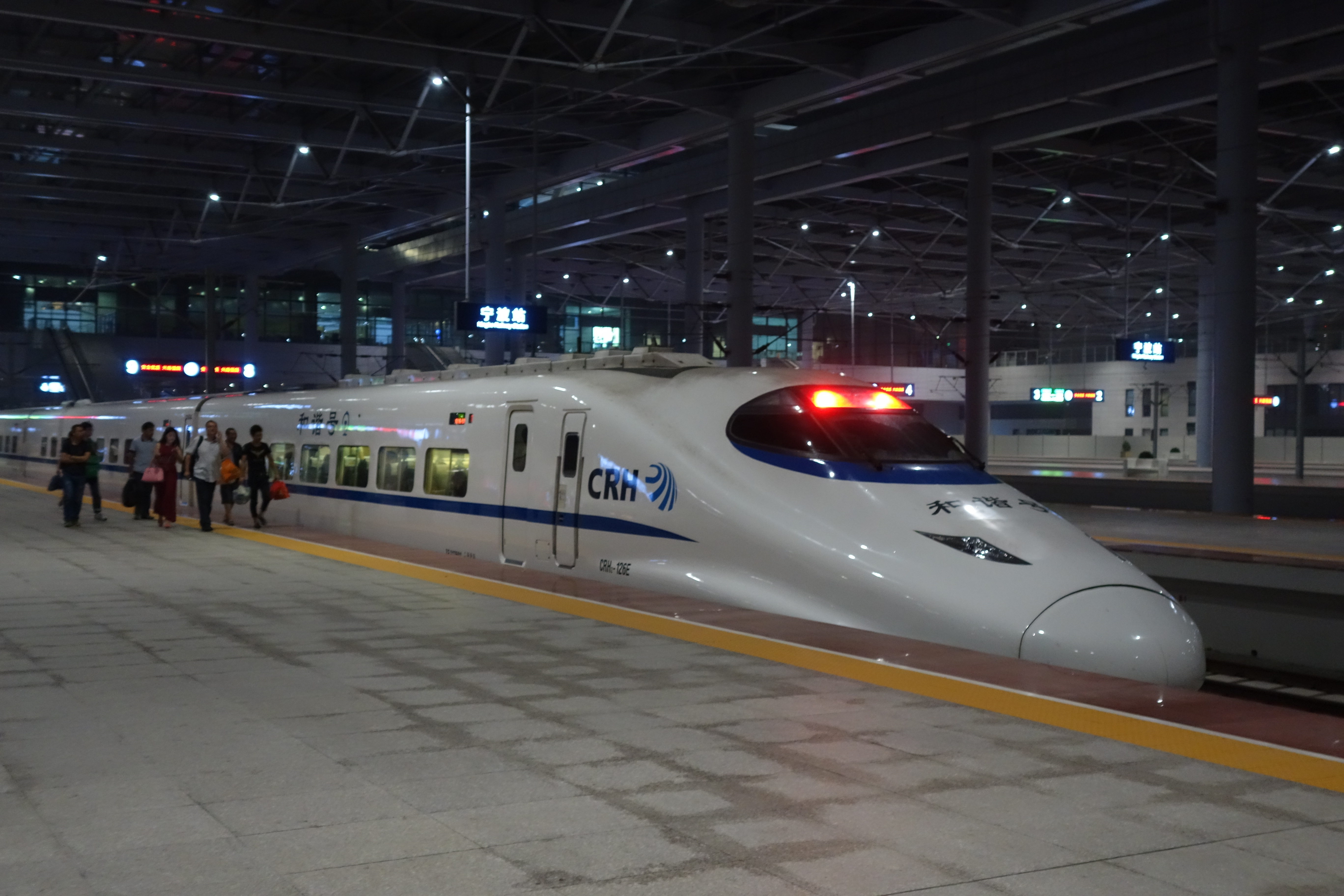 CRH2-126E停靠宁波站